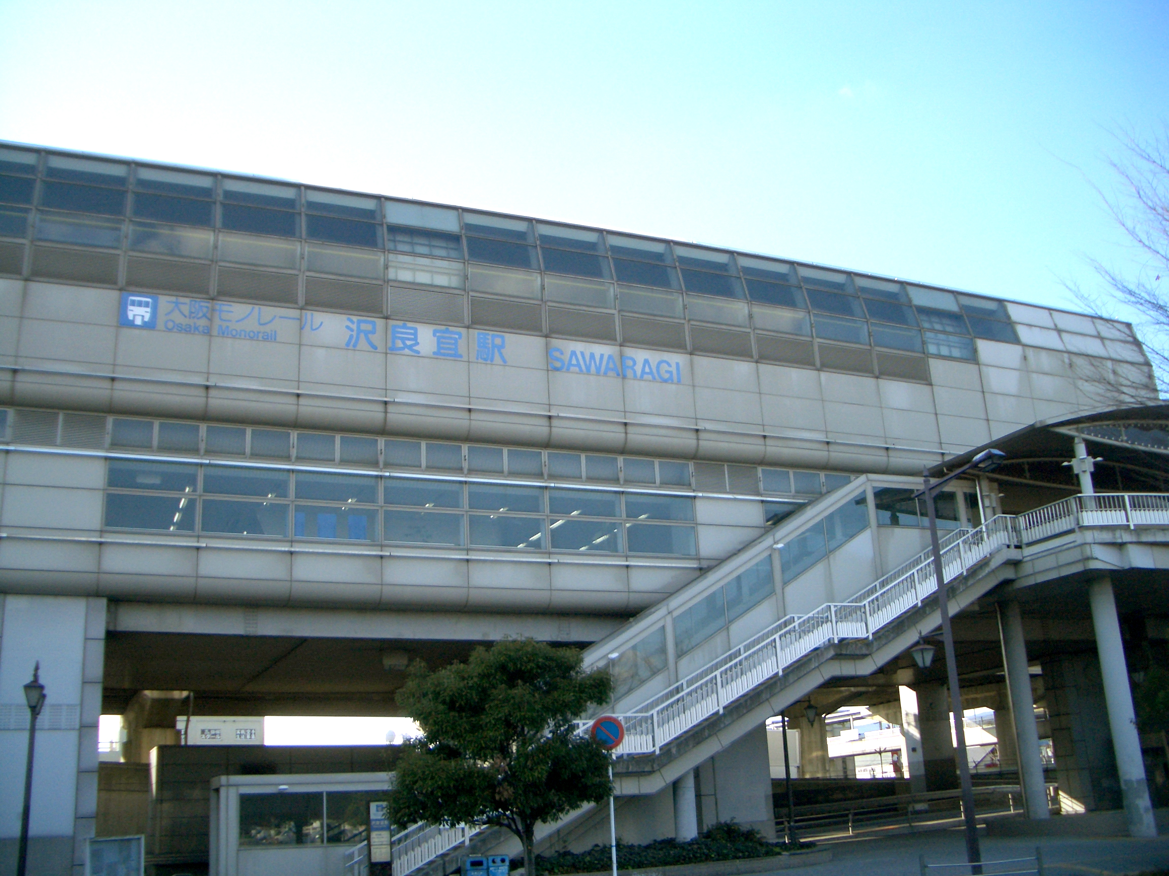 Sawaragi Station,Takahamacho Ibaraki-City Osaka Japan.